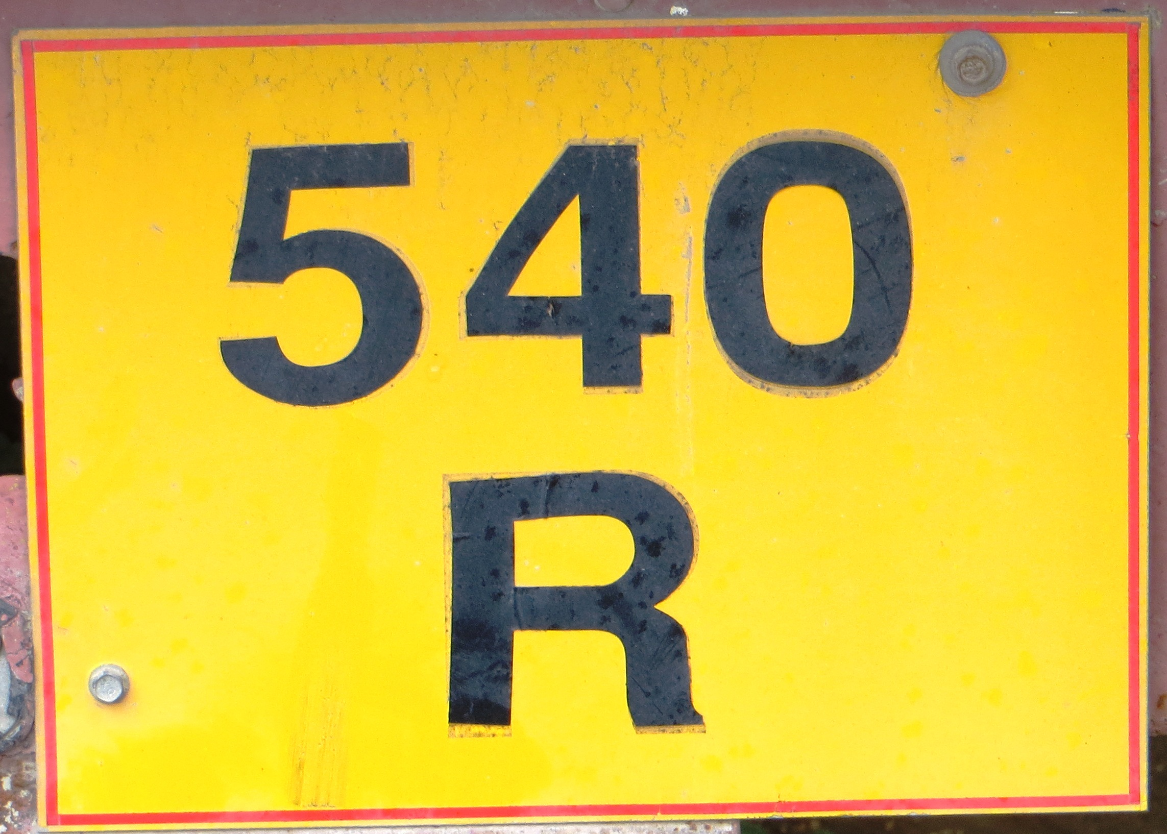 Kentekenplaat Noord Cyprus achter